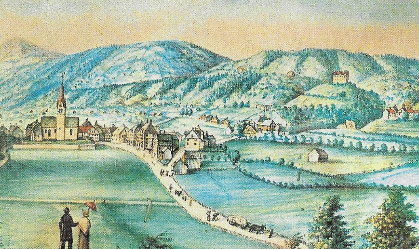 Aquarell von Wattwil mit Pfaffenwiese, Paritätischer Kirche, Speer (Berg), Dorfhäuser, Iburg und Kloster, Künstler unbekannt